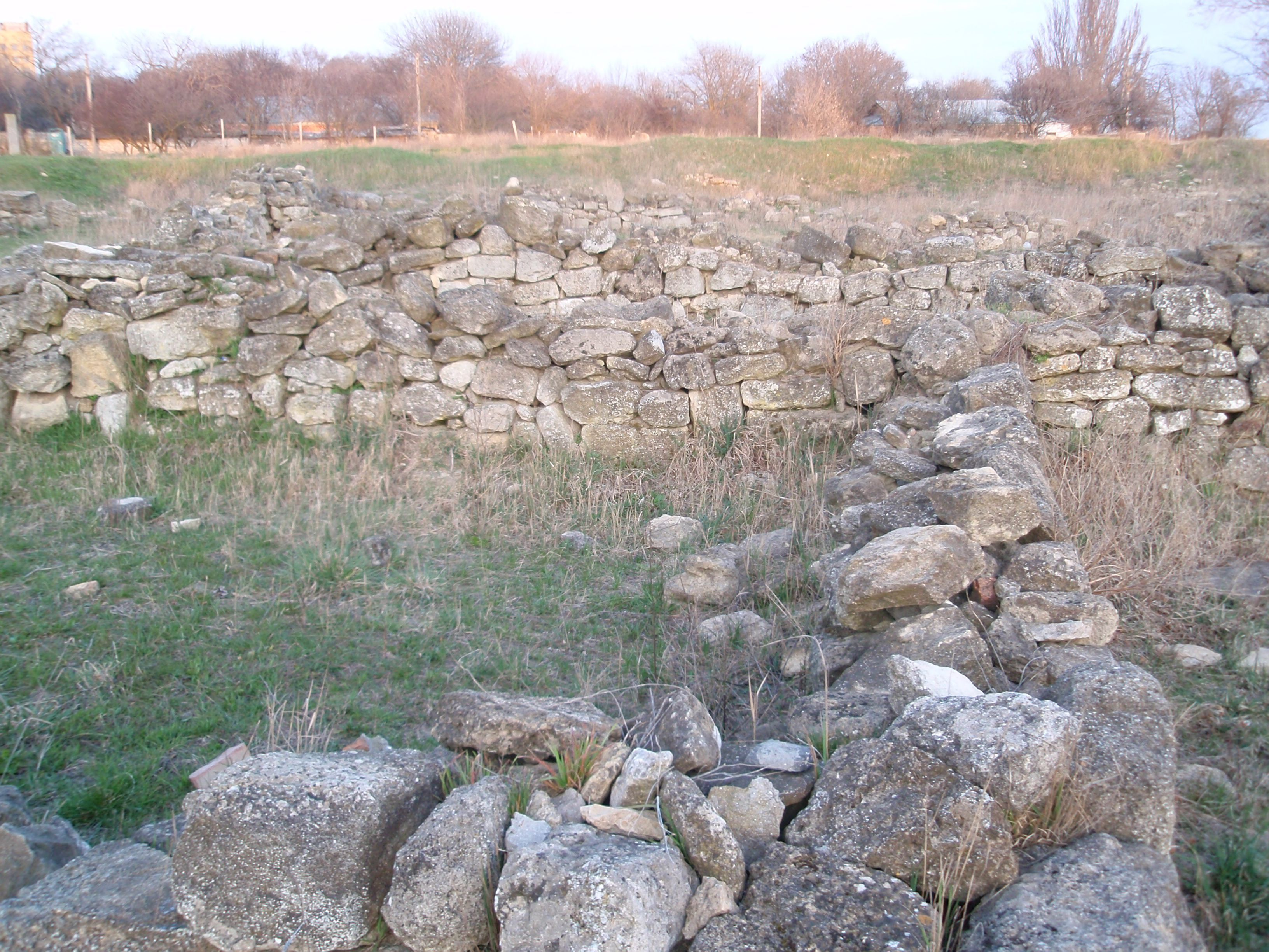 Археологічний комплекс «Стародавнє місто Мірмекій», Керч, між вул. Войкова та вул. Московською, 52-а